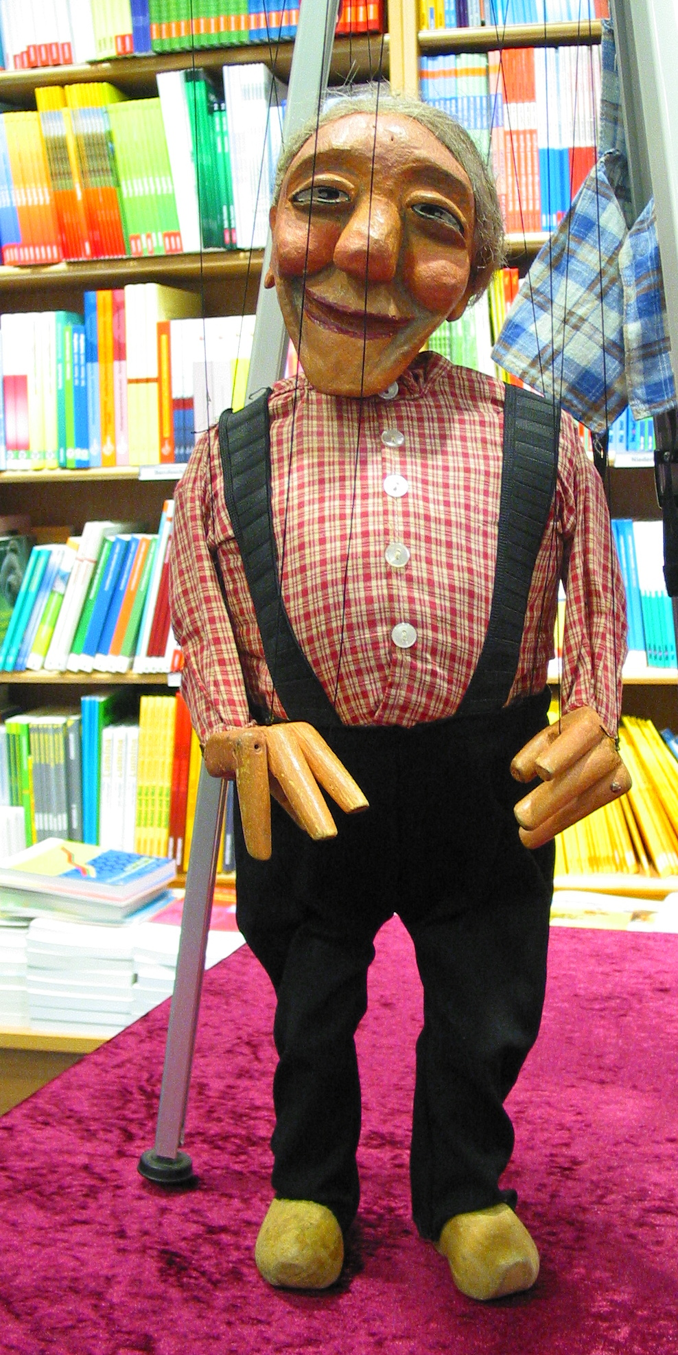 Figur "Matthes" vom Marionettentheater Kriewelsche pappköpp